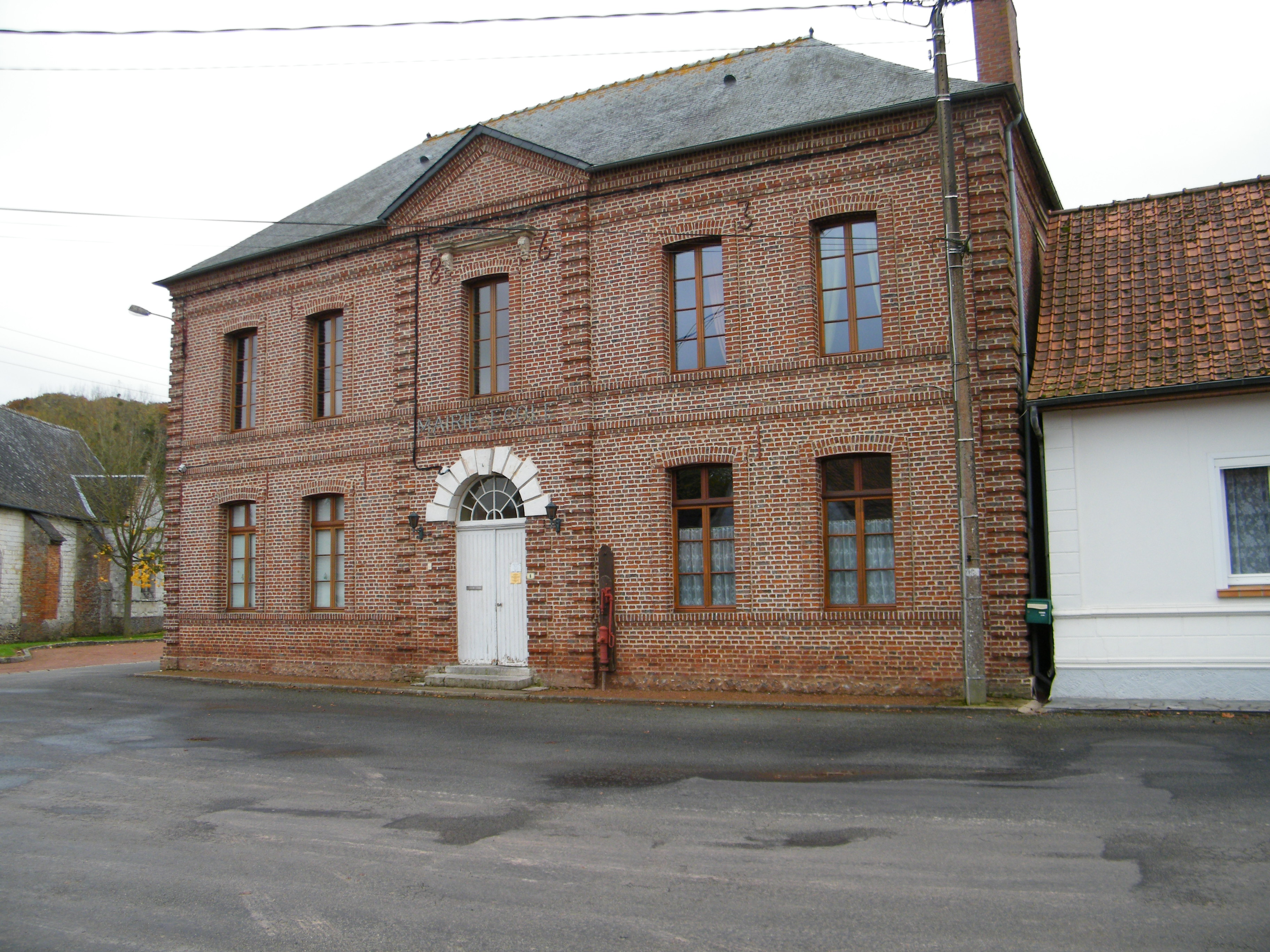 Tortefontaine, Pas-de-Calais, Fr, mairie de 1863.